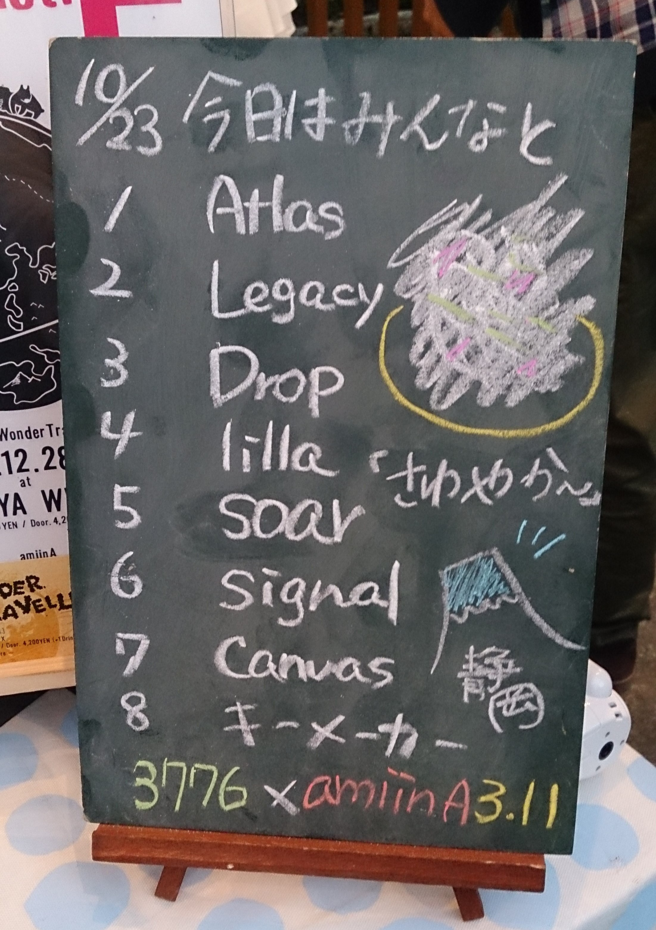 amiinAセトリボード(20161023(1))